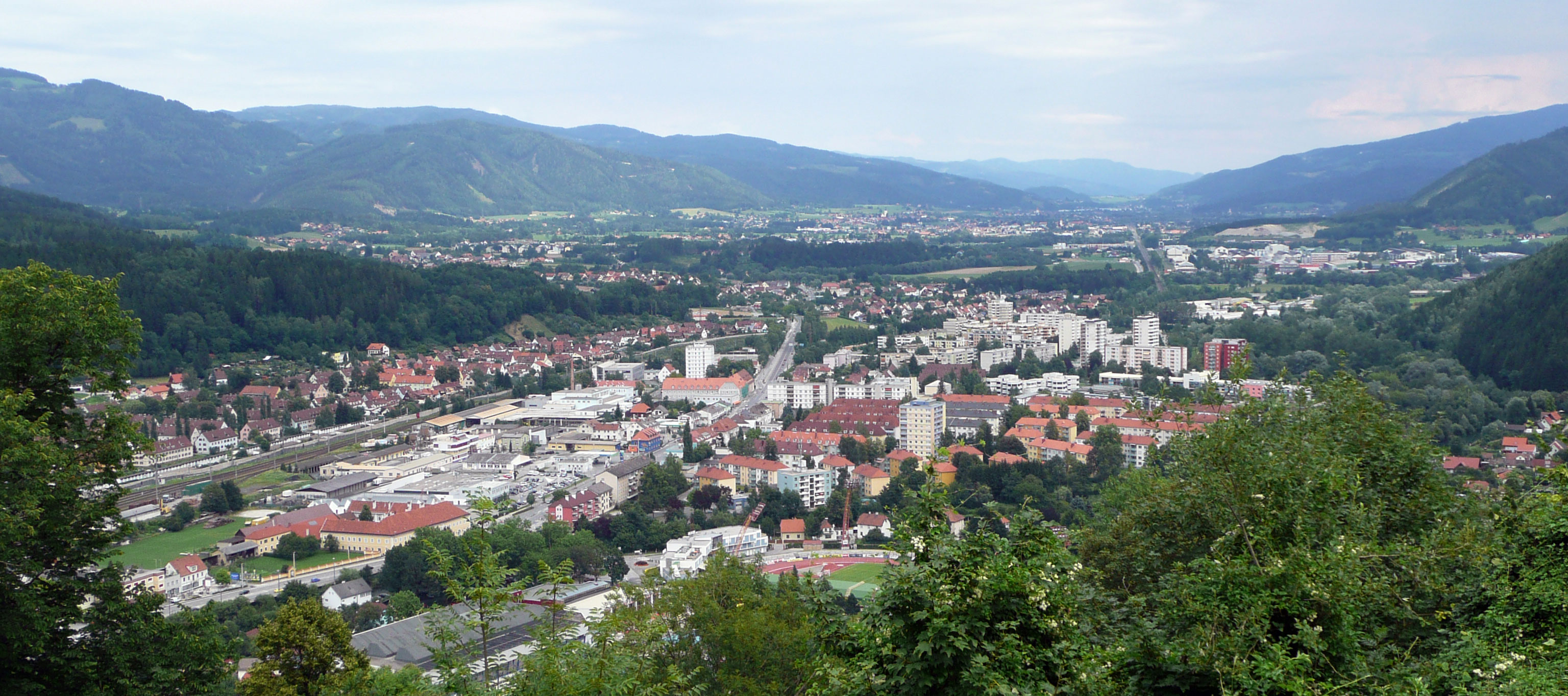 Kapfenberg am Mürzdall